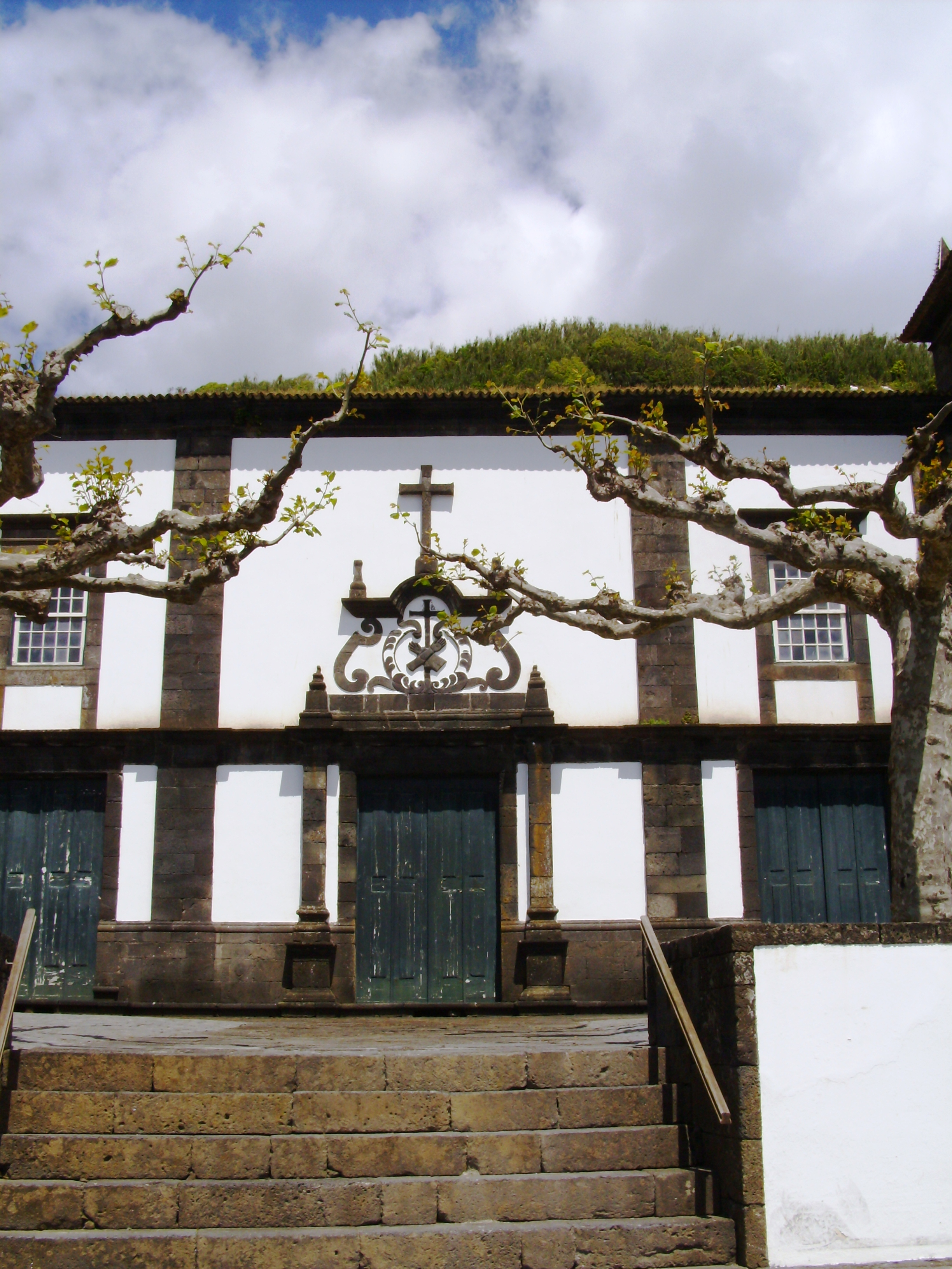 Convento dos Franciscanos e Igreja de Nossa Senhora da Conceição, freguesia e concelho de Lajes do Pico, ilha do Pico, Açores: vista da entrada.